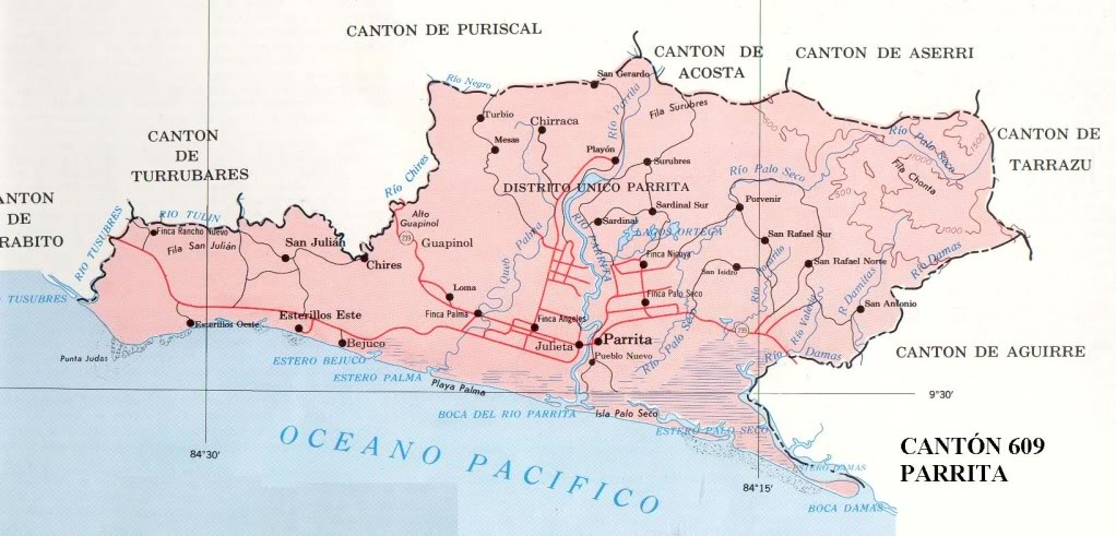 Cantón de Parrita